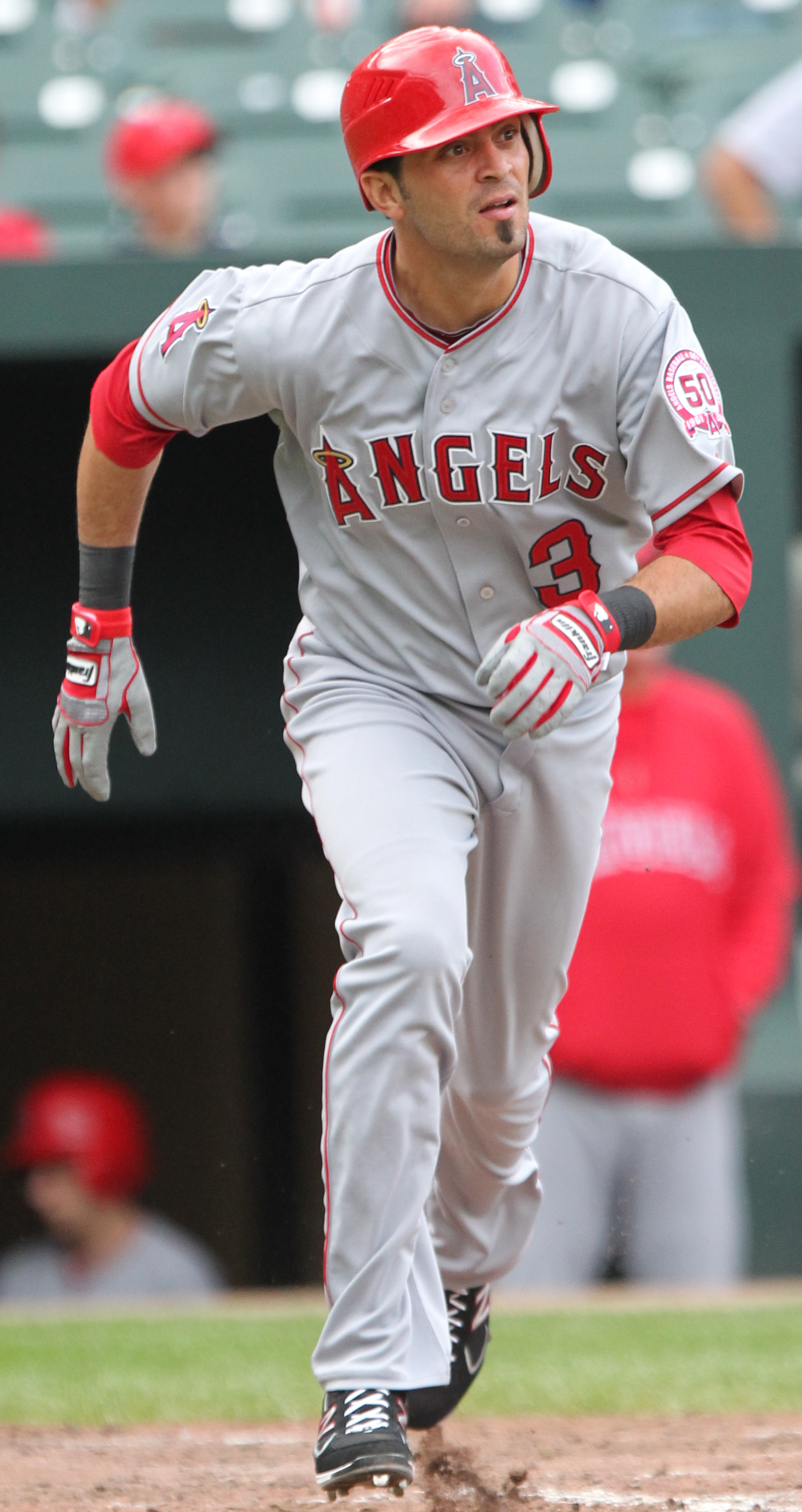 Gil Velazquez